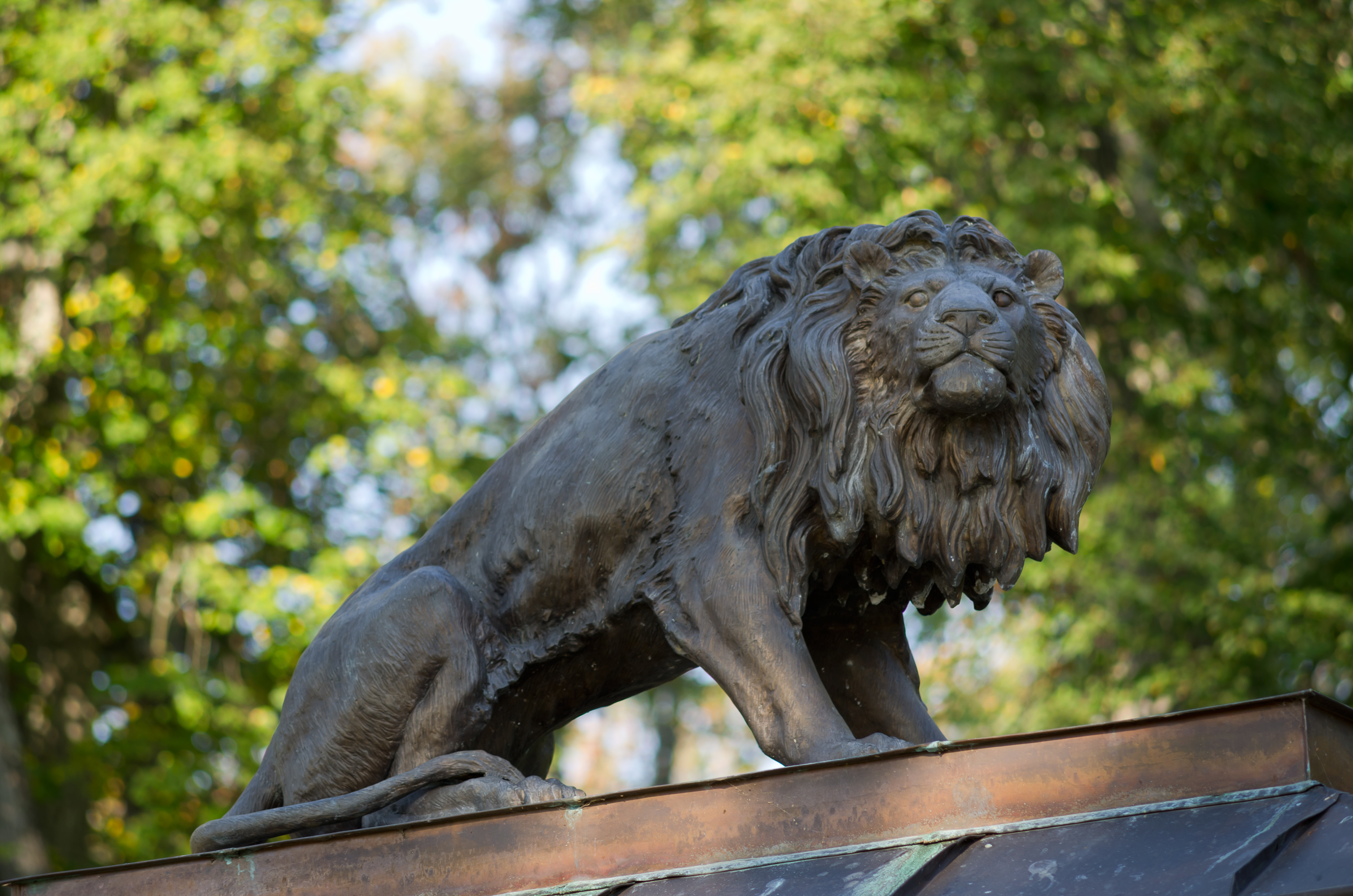 Mäksa mõis, lõviskulptuurid väraval